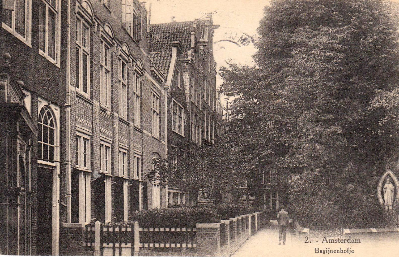 Bagijnenhofje, Amsterdam.